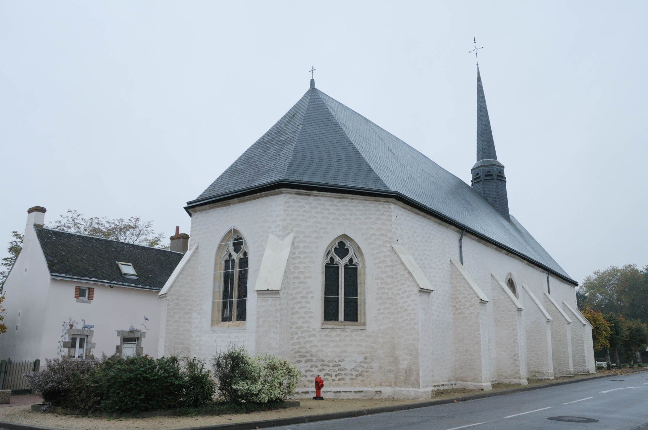 Église Saint-Remi, Chanteau, Loiret, France